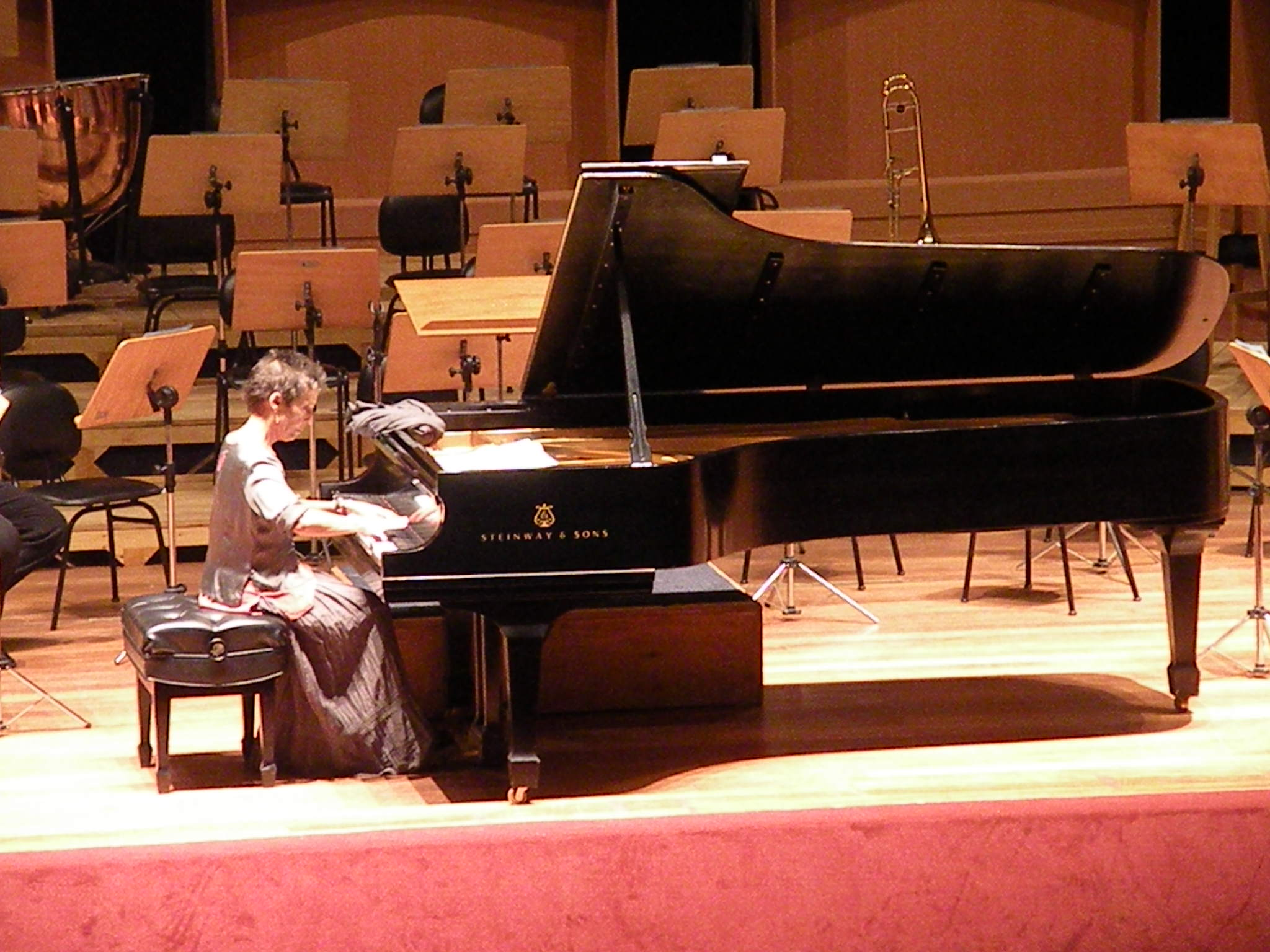 Maria João Pires (Foto: Secom)